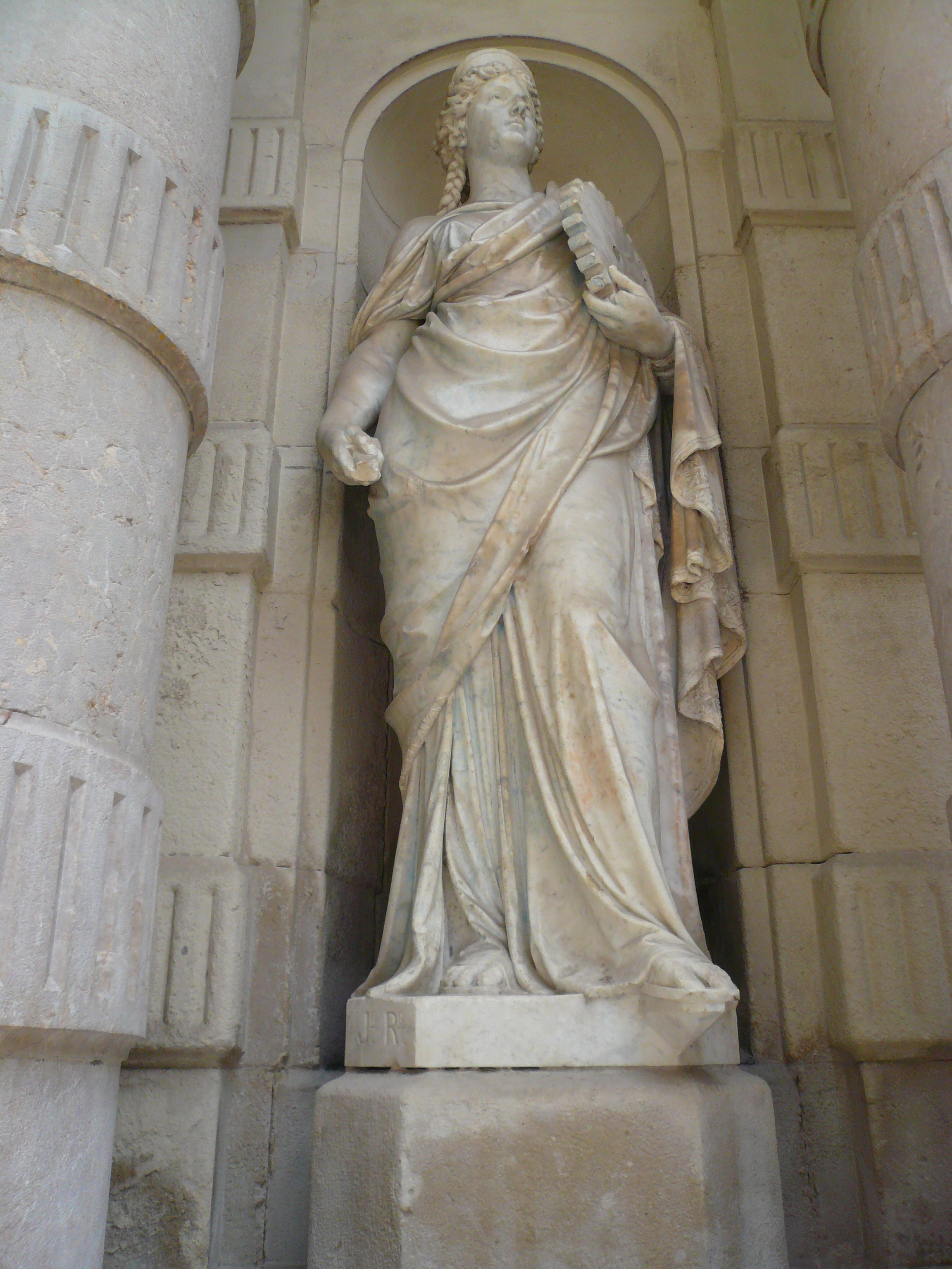 La Indústria. C. d'Avinyó, 23. Façana del Casino Mercantil o Borsí, antiga seu de La Llotja. Plaça de la Verònica (Barcelona). Escultor: Joan Roig i Solé, signada. Material: pedra. C. 1888. 35″ N, 2° 10′ 38.96″ E